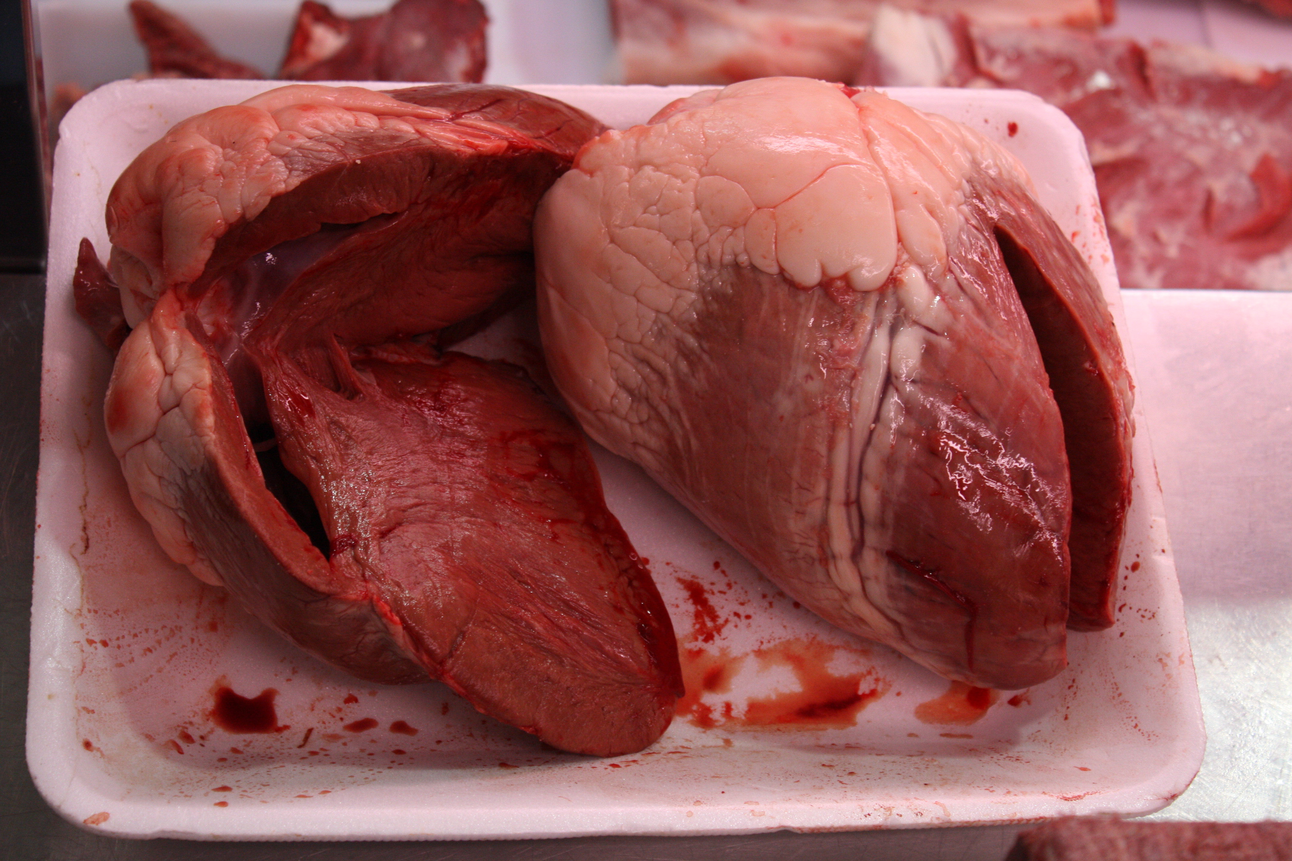 Corazóns de becerra postos á venda.